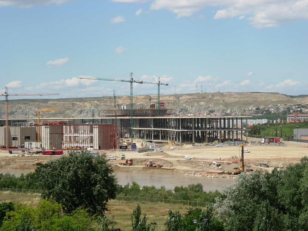 Obras de la Expo de Zaragoza vistas desde la calle Sierra Vicor.